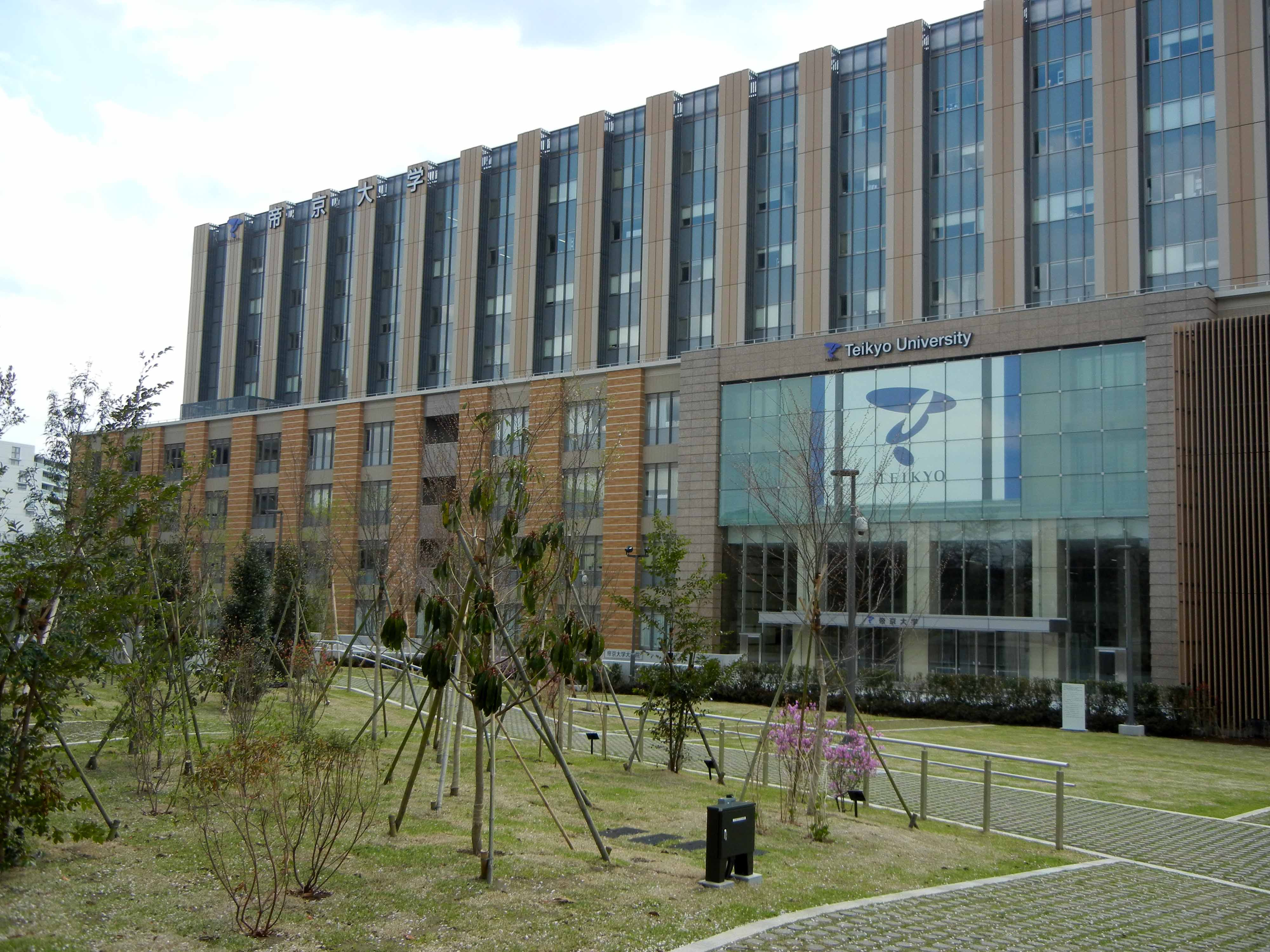 帝京大学板橋キャンパス 大学棟本館